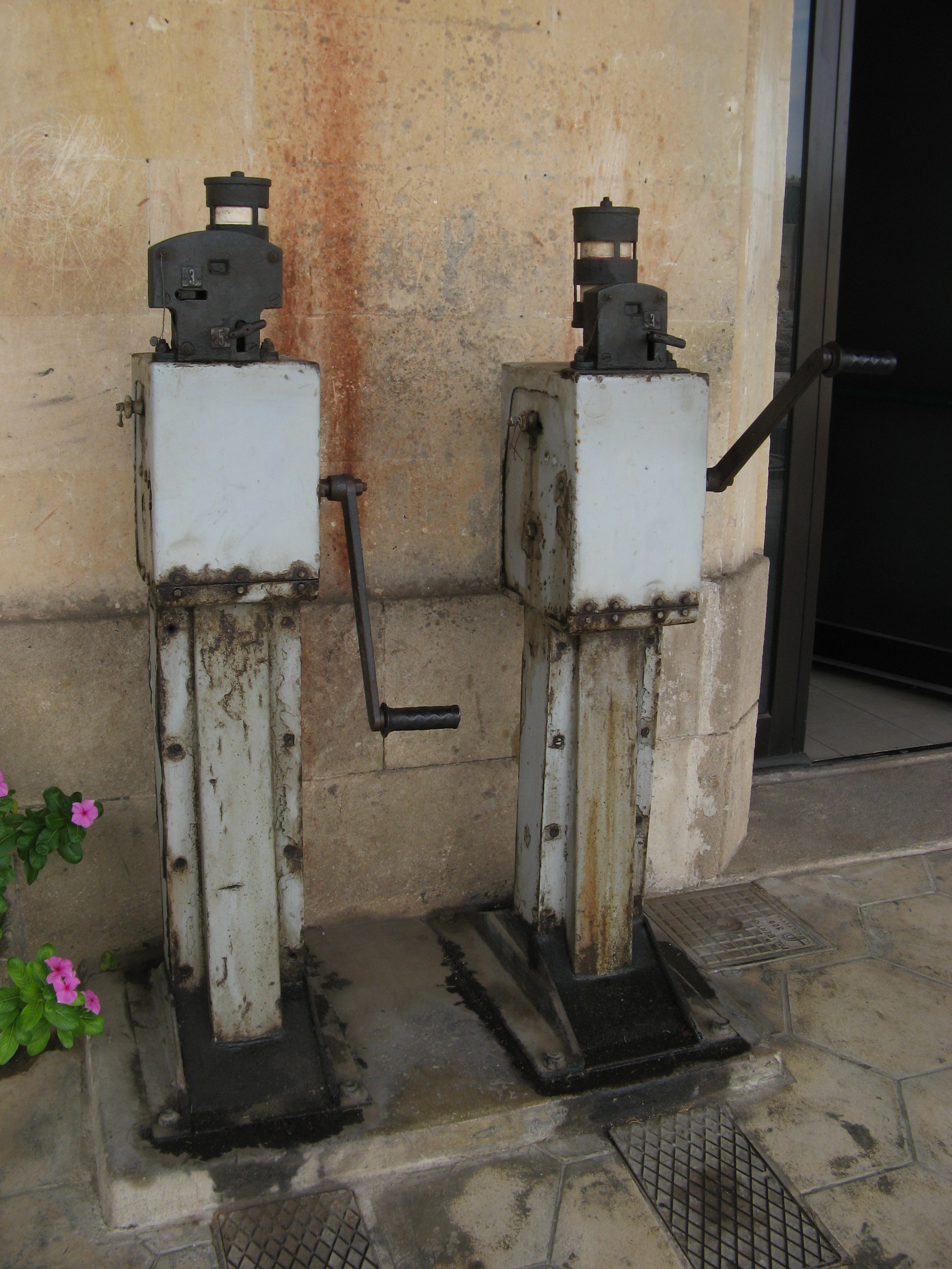 Leve usate dalle ferrovie del sud est per alzare e abbassare le barre dei passaggi a livello.